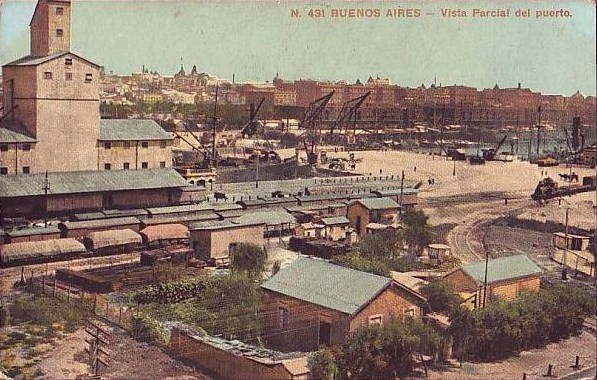 Vista del dique 2 de Puerto Madero hacia el centro de Buenos Aires. Se ve un grupo de casas con un parque y un depósito de cereales que ya no existen. Hacia el fondo, se distinguen los edificios sobre la Avenida Alem.